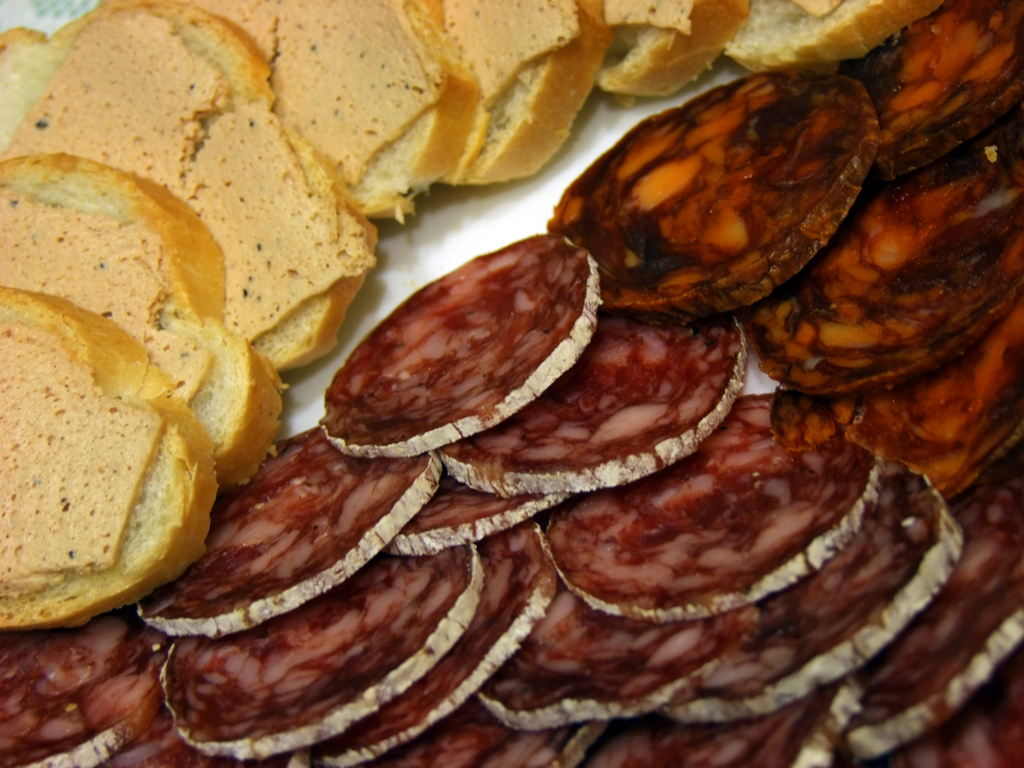 Paté de ibérico, salchichón y chorizo.